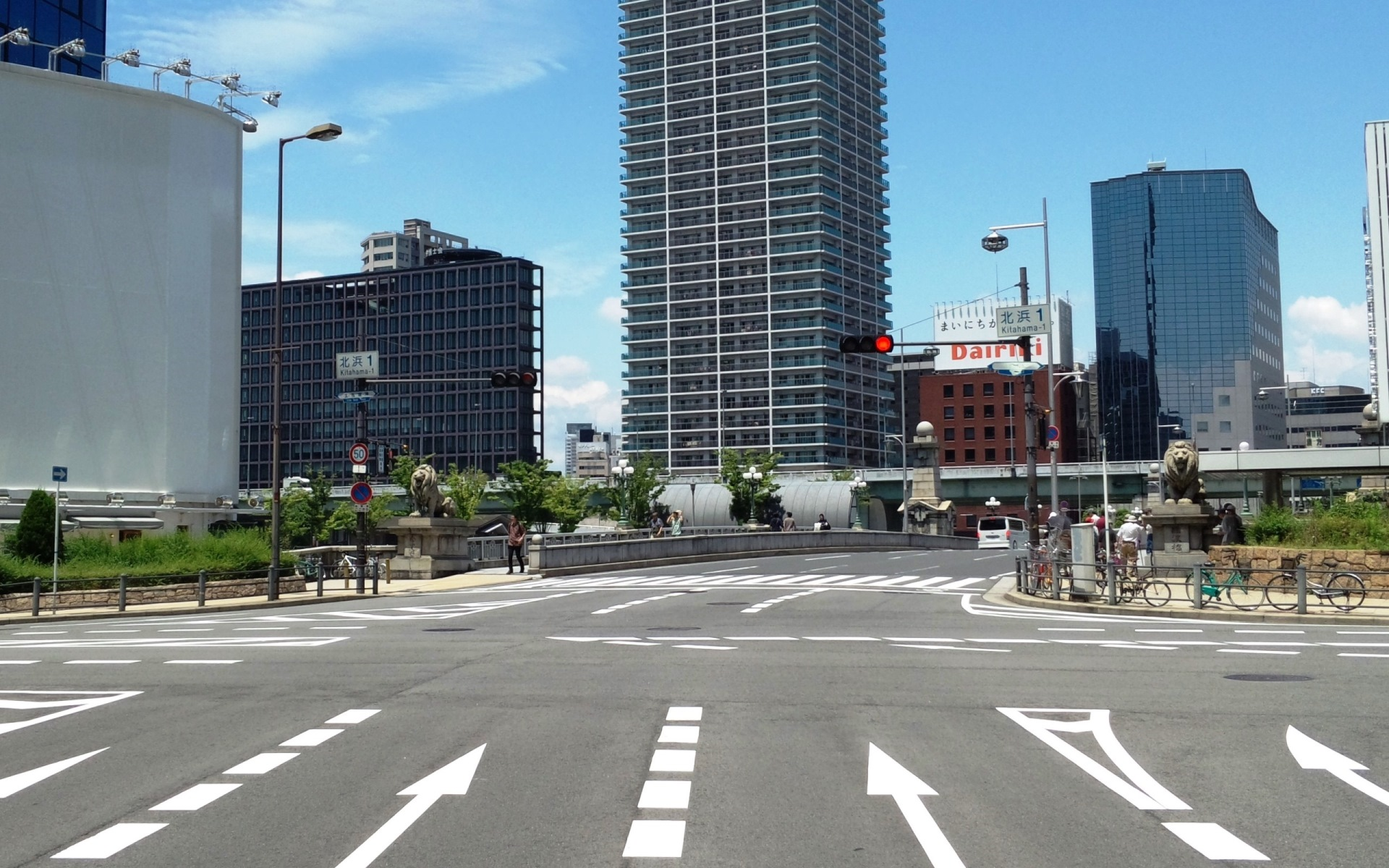 堺筋・北浜一交差点